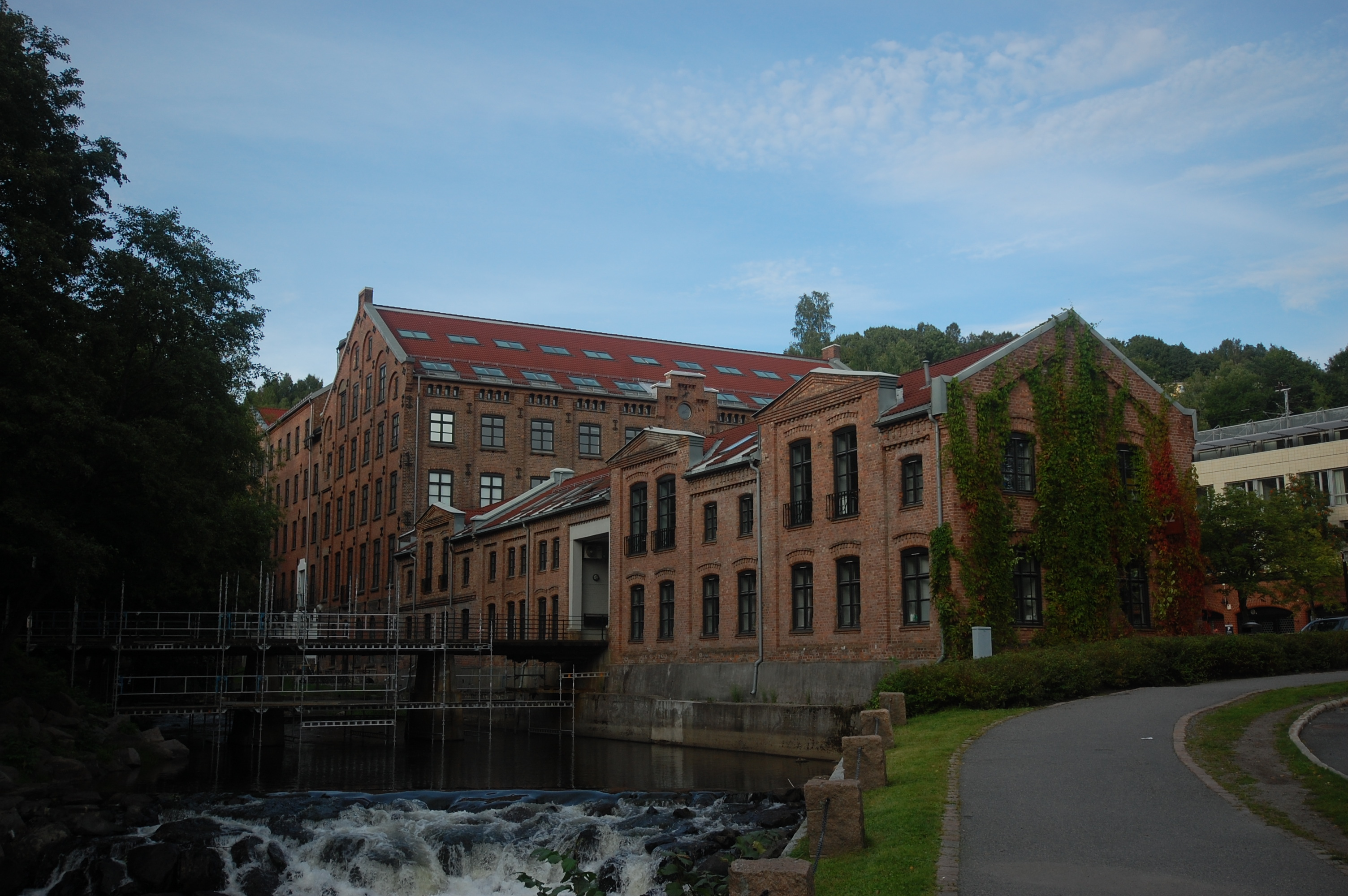 Nydalens Compagnie. I forgrunnen ruggeribygningen, bak sees Veveri A.